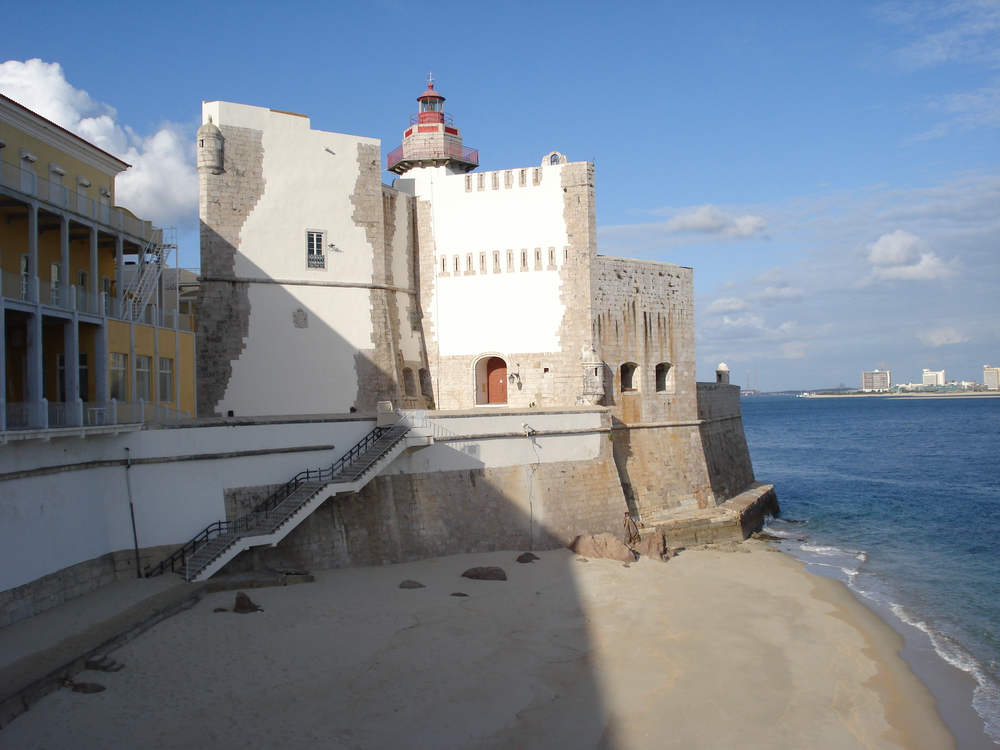 Forte de Santiago do Outão, vista Oeste